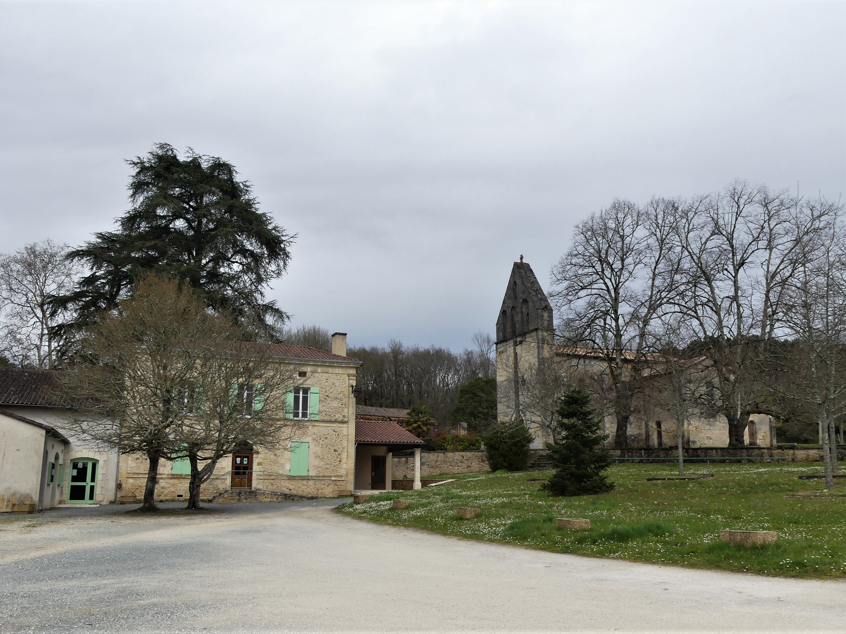 La mairie et l'église, Église-Neuve-d'Issac, Dordogne, France.